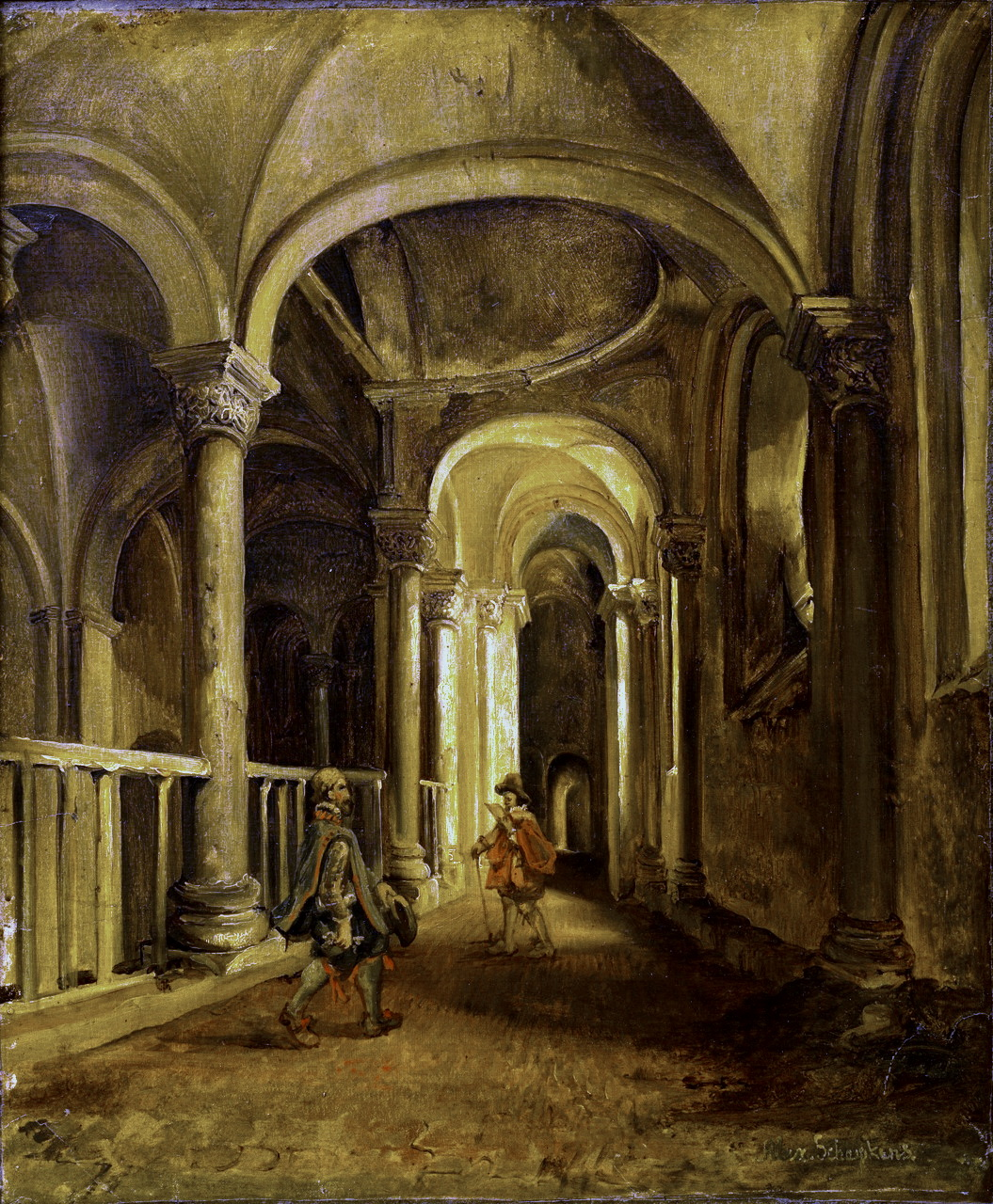 Olieverfschilderij door Alexander Schaepkens van het westwerk in de Sint-Servaaskerk in Maastricht. Formaat: 58 x 48,3 cm (excl. lijst). Collectie Bonnefantenmuseum Maastricht, objectnummer 1000963 (bruikleen 1951).